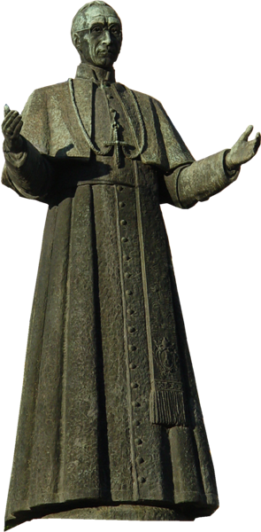 Foto Jose Goncalves Estátua do Papa Pio XII no Larlo da Senhora-a-Branca em Braga, Portugal